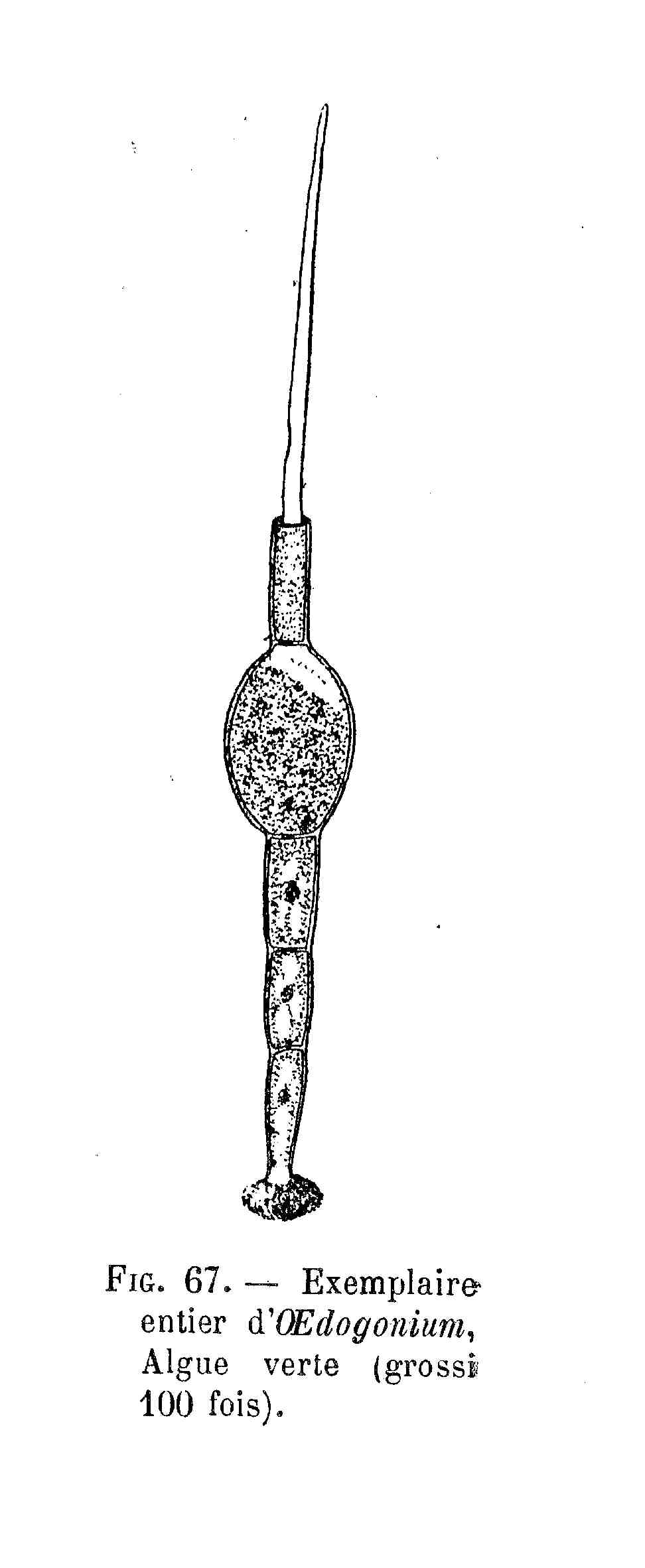 Oedogonium - dessin